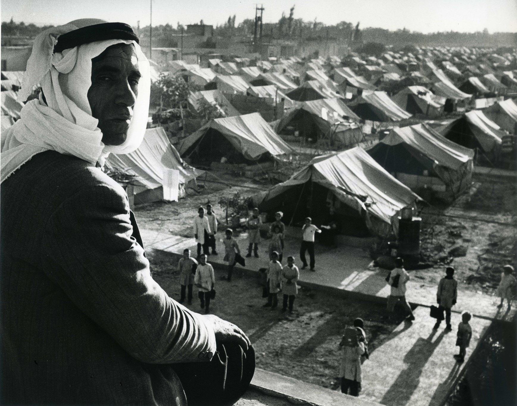 Nakba 1948 Palestine - Jaramana Refugee Camp, Damascus, Syria